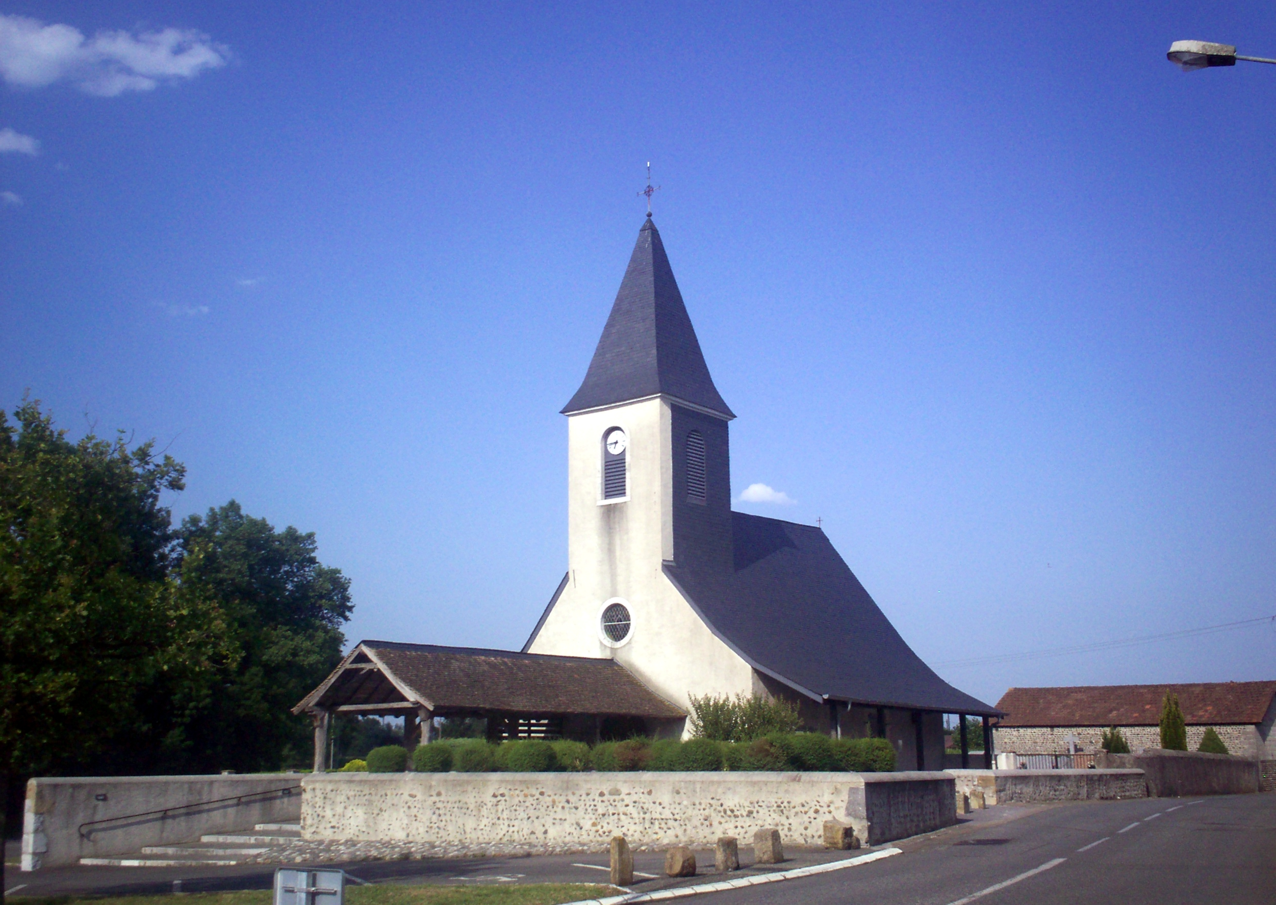 gleisa d'avidos, Bearn (Abidos)